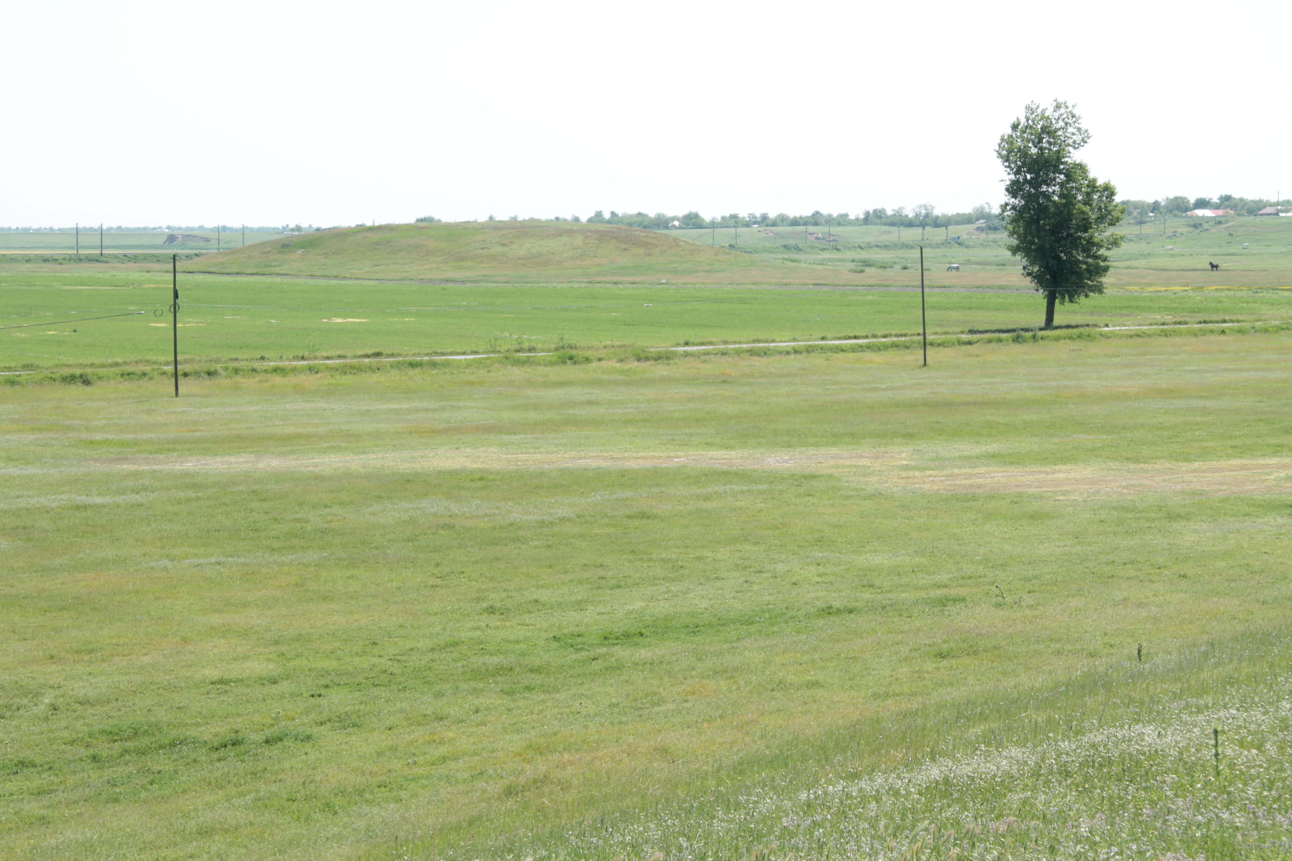 Morminte sarmatice 01